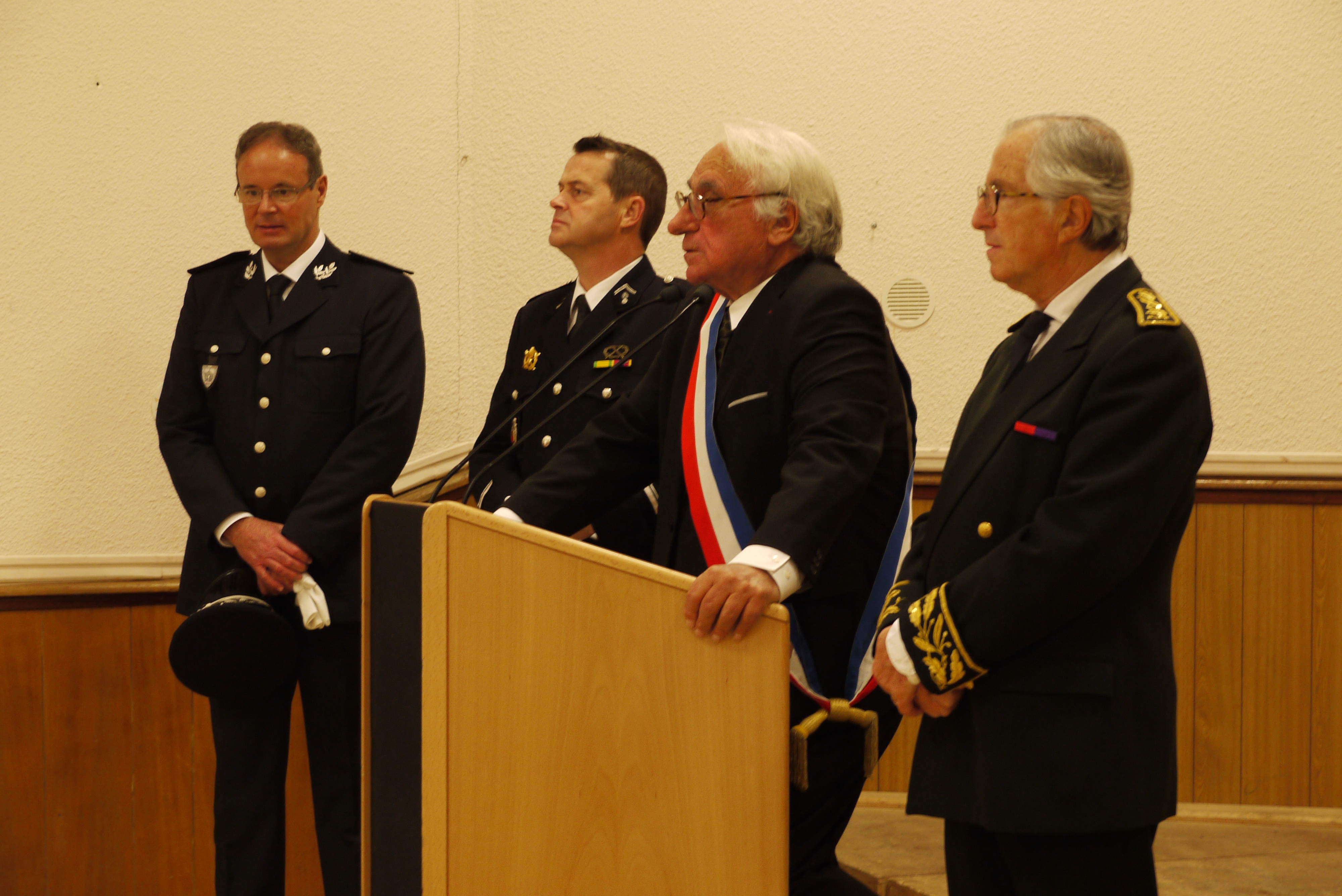 Discours du maire de Céret Alain Torrent pour la cérémonie du 11 novembre, avec à droite le sous-préfet Gilles Giuliani.